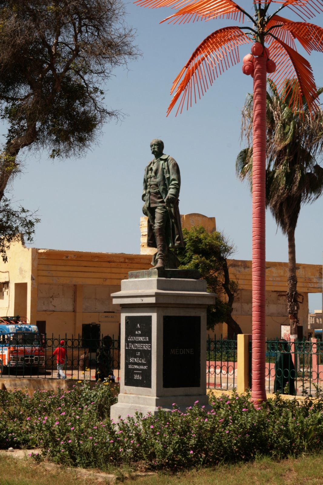 Statue de Louis Faidherbe à Saint-Louis, Sénégal, en arrière-plan l'ancienne salle de cinéma "Rex"